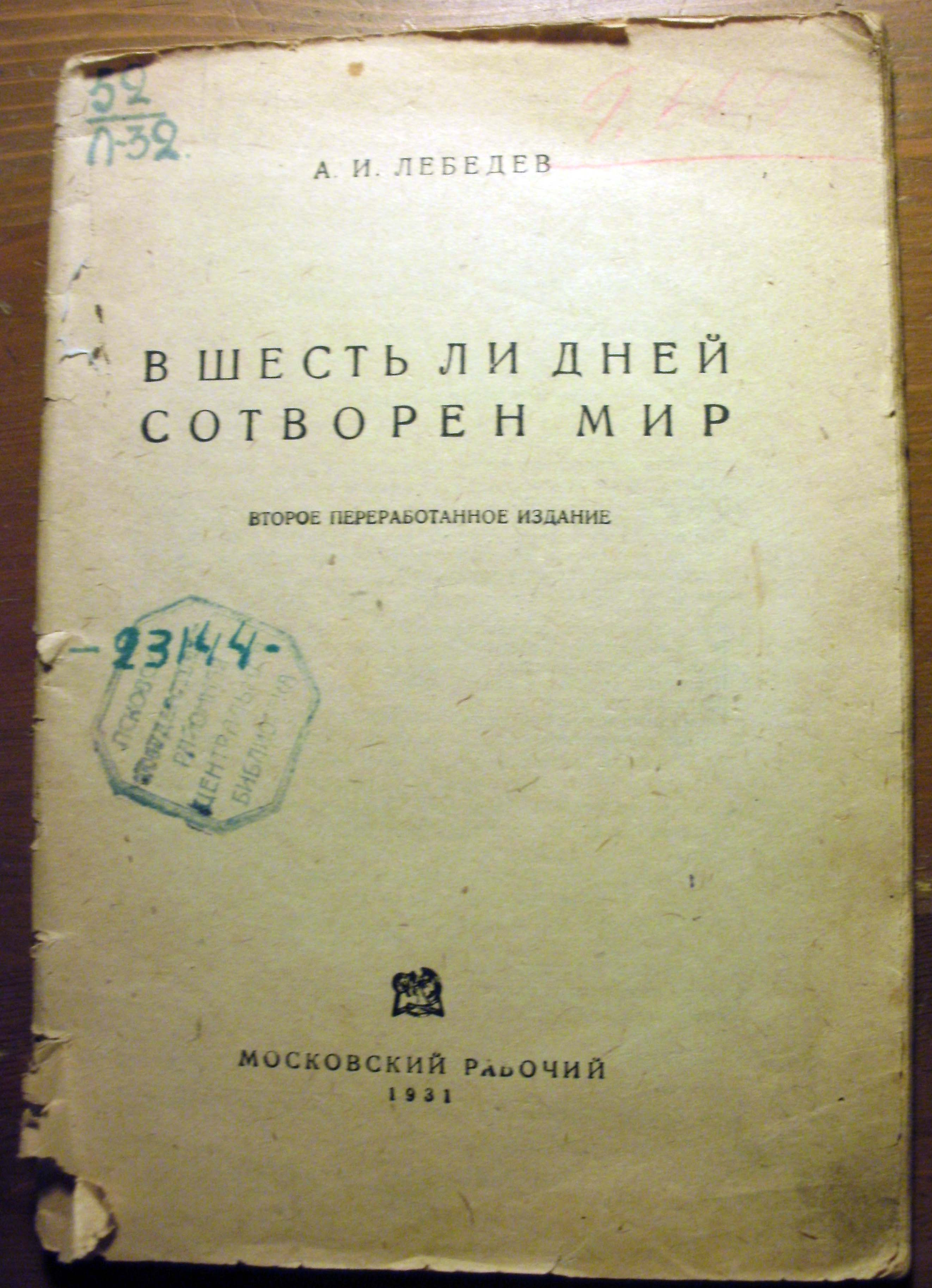 В шесть ли дней сотворен мир, брошюра, Московский рабочий, 1931